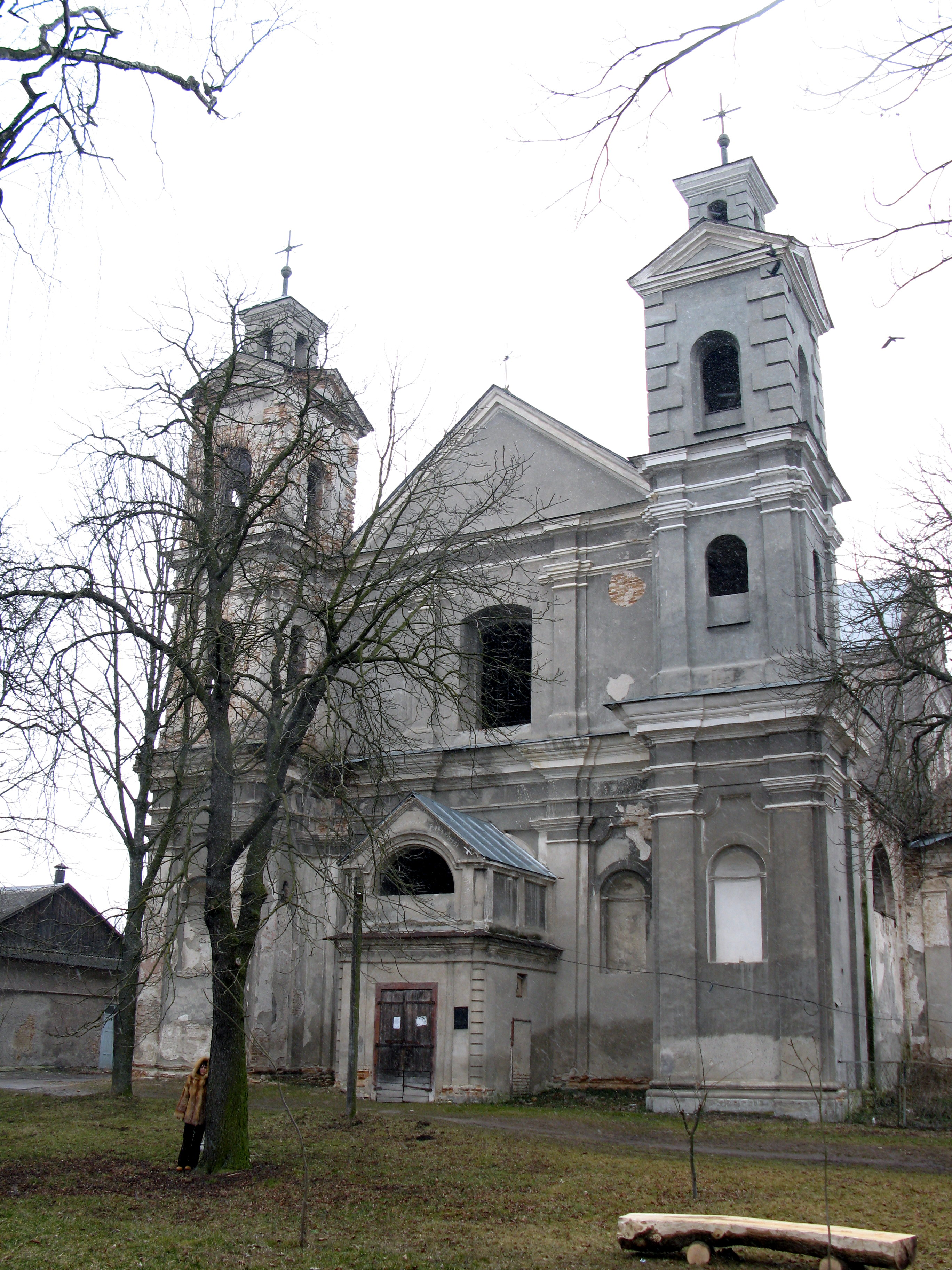 Троїцький костел (мур.), Берестечко